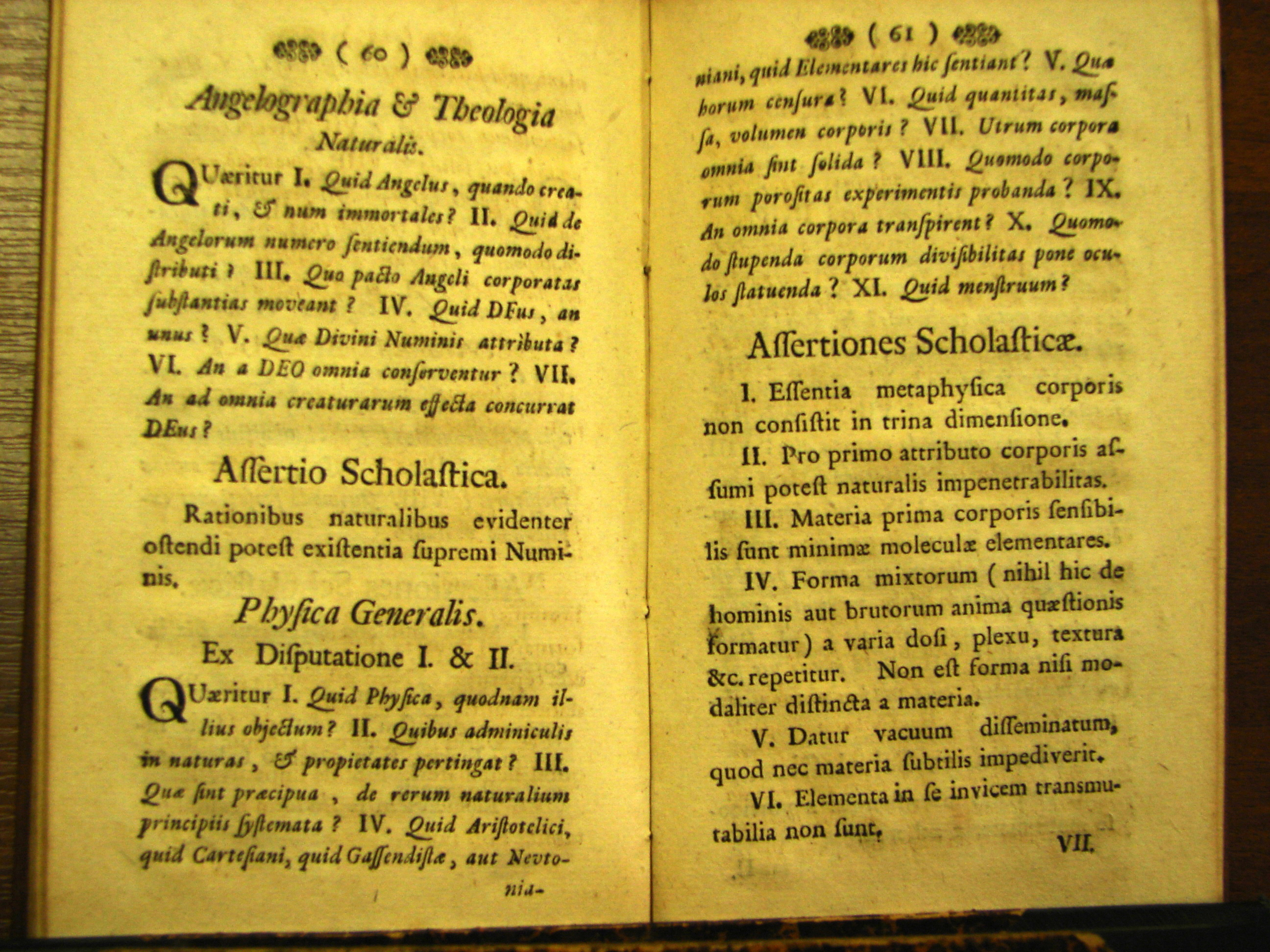 Ukázka z díla J. Steplinga